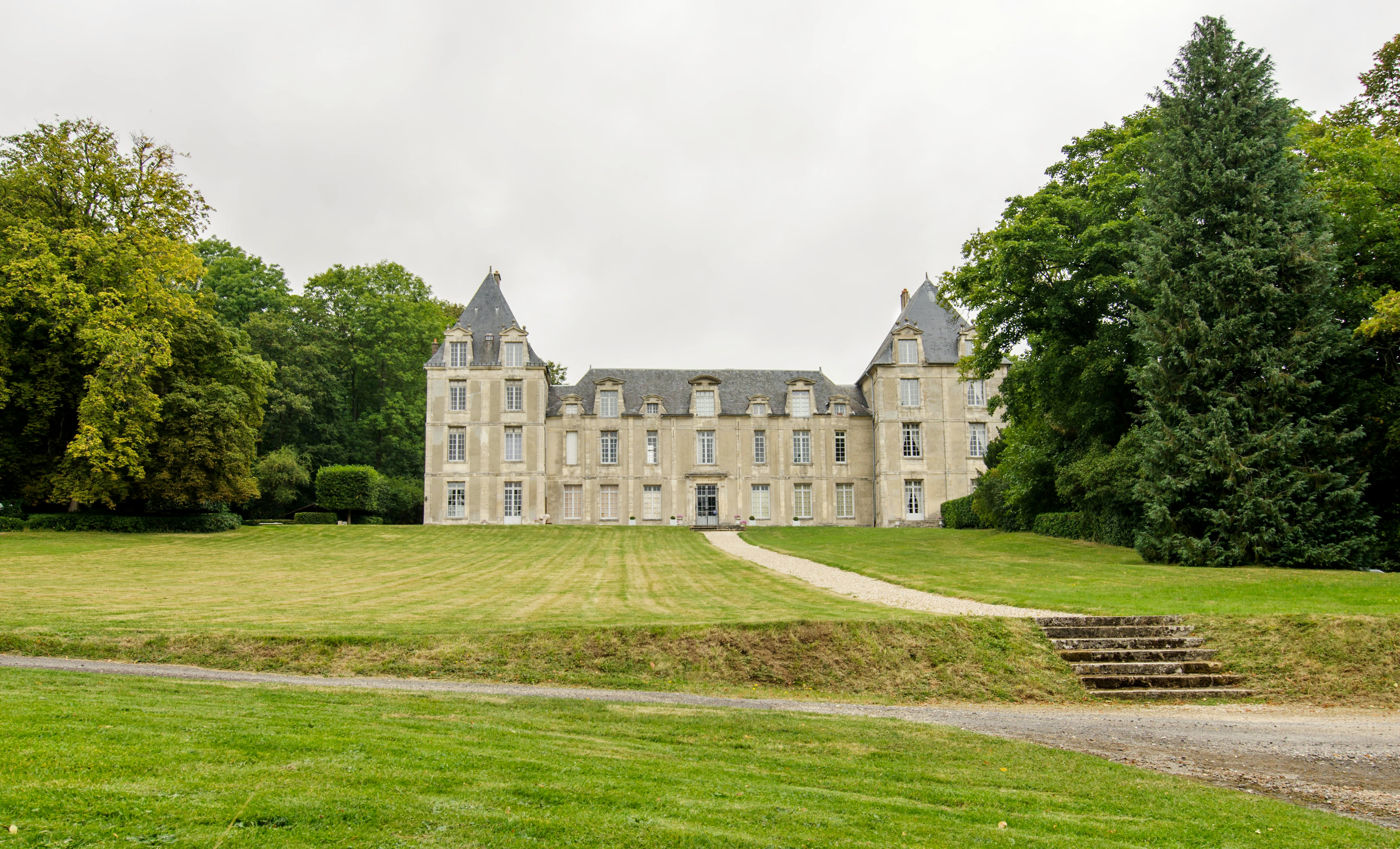 Château de Villers-en-Arthies (Val-d'Oise, France) .